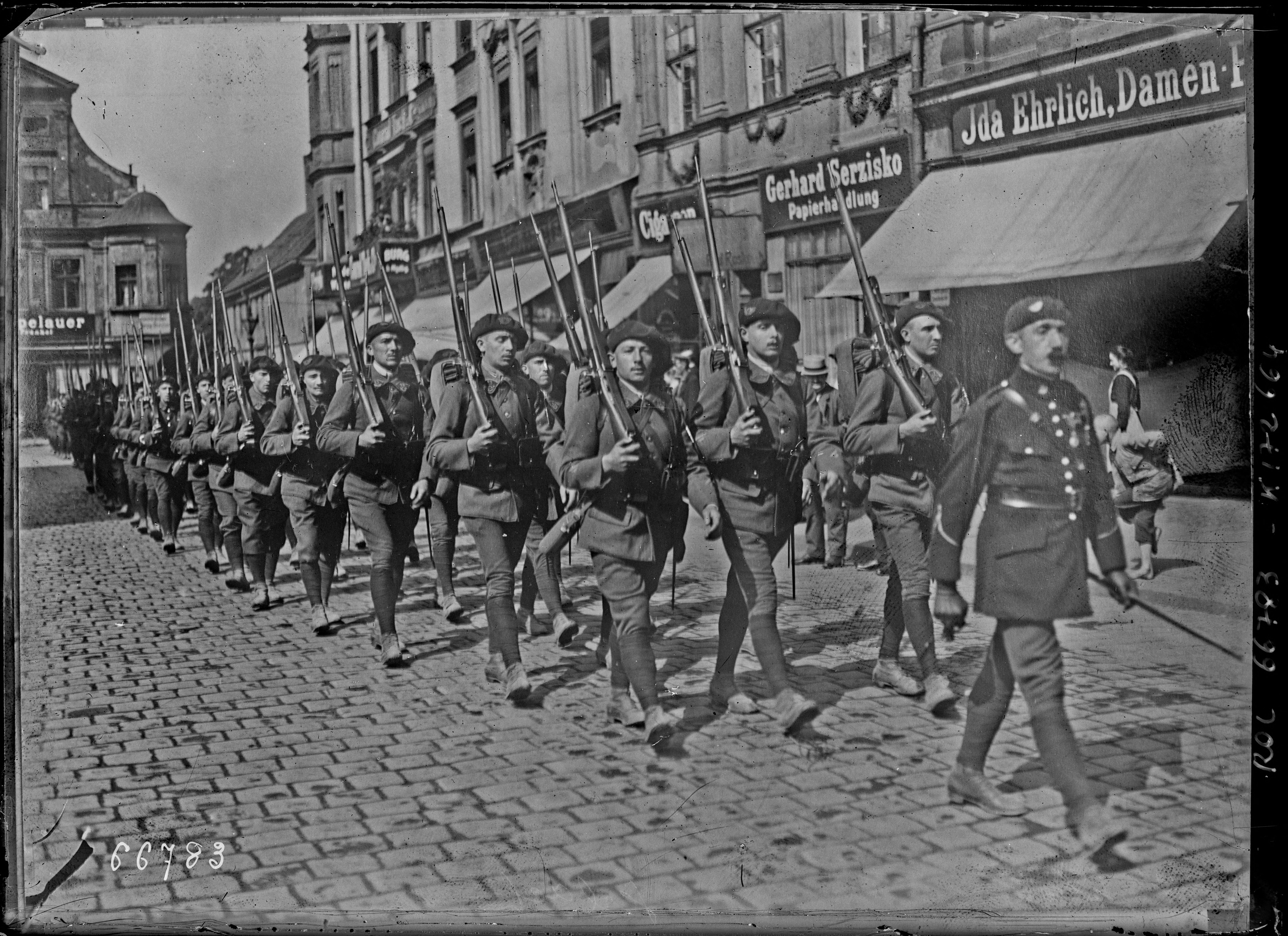 Haute Silésie (Gerlach) [une troupe de chasseurs alpins défile à Opole] : [photographie de presse] / [Agence Rol] photogr. nég. sur verre ; 13 x 18 cm (sup.)